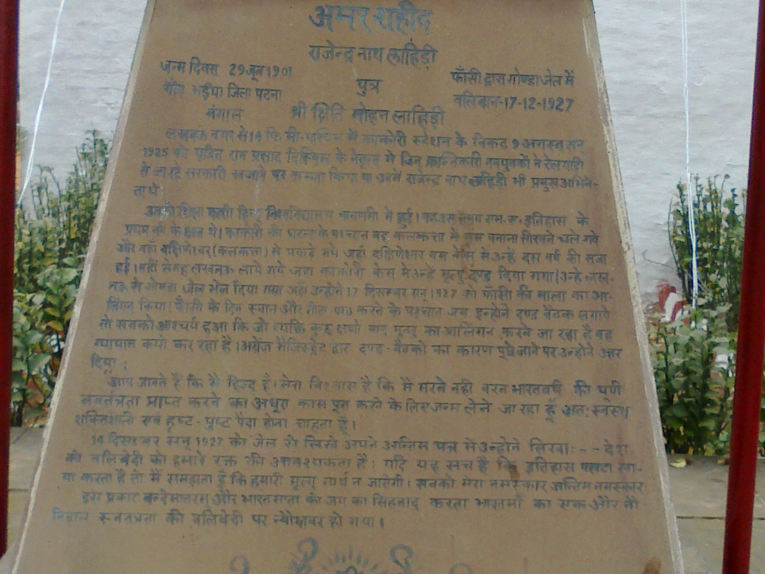 गोण्डा जिला कारागार के फाँसी गृह में स्थापित लाहिड़ी का जीवनवृत्त शिलापट्ट।